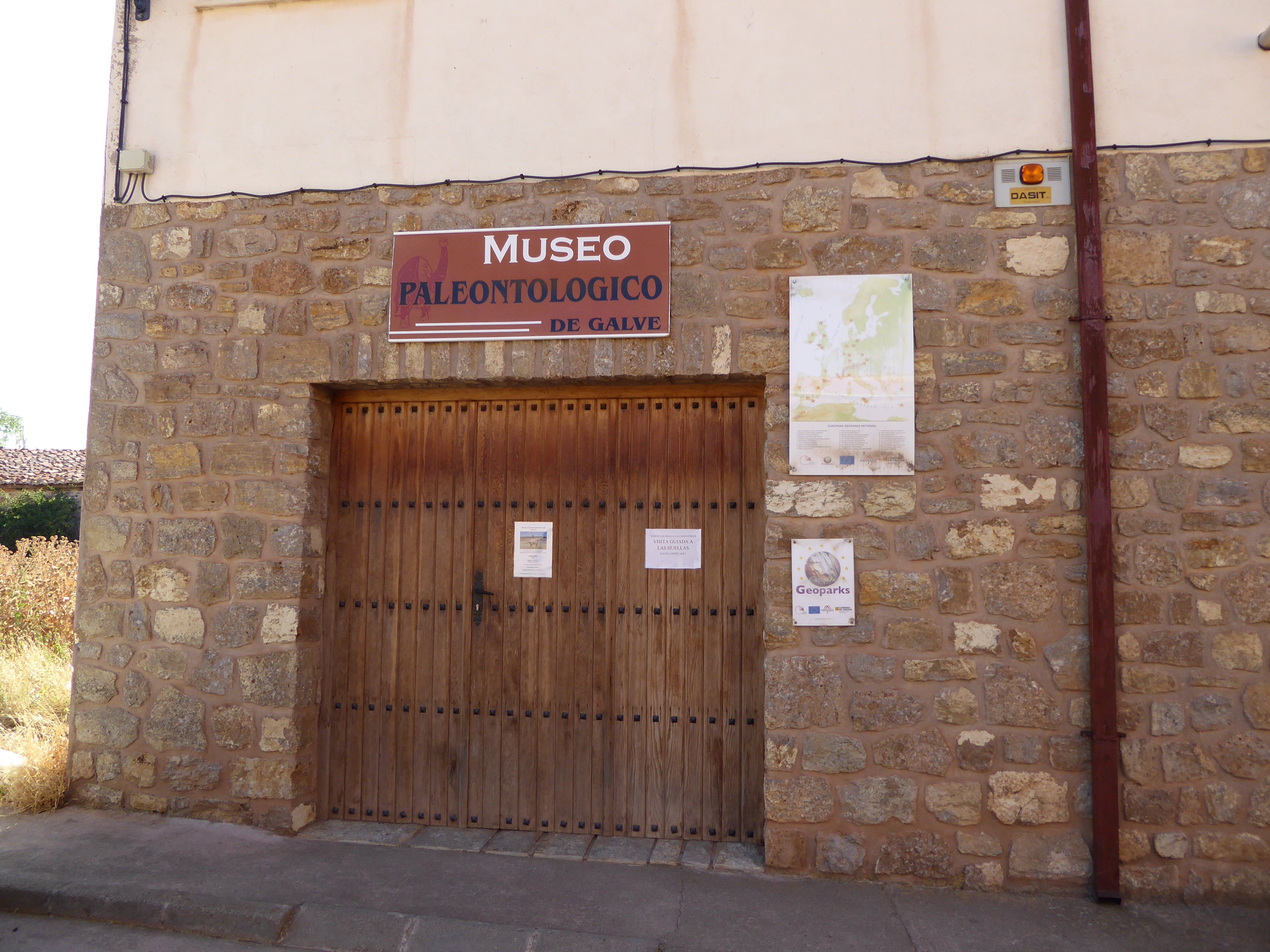 Galve